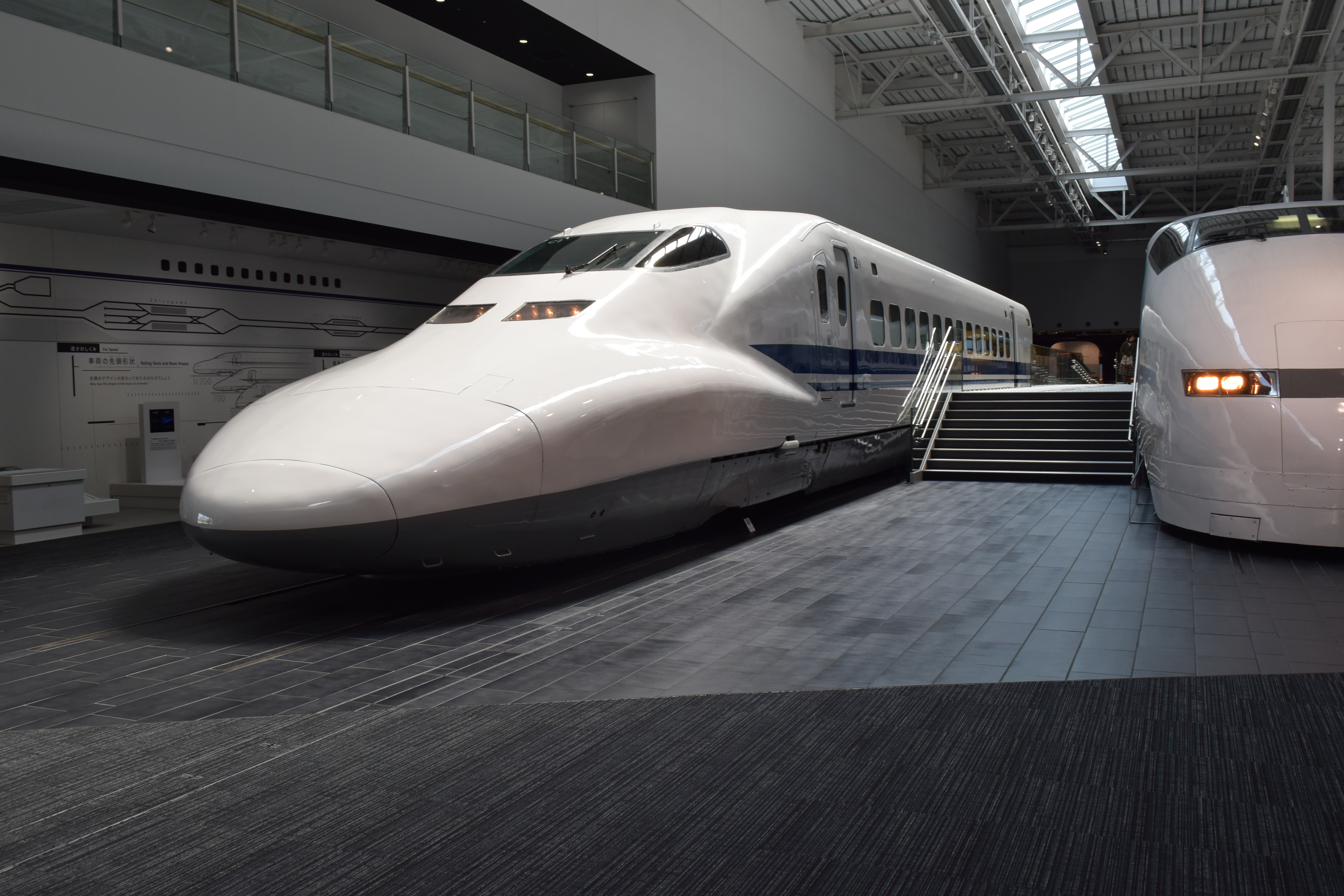 Maglev And Railway Park Nagoya